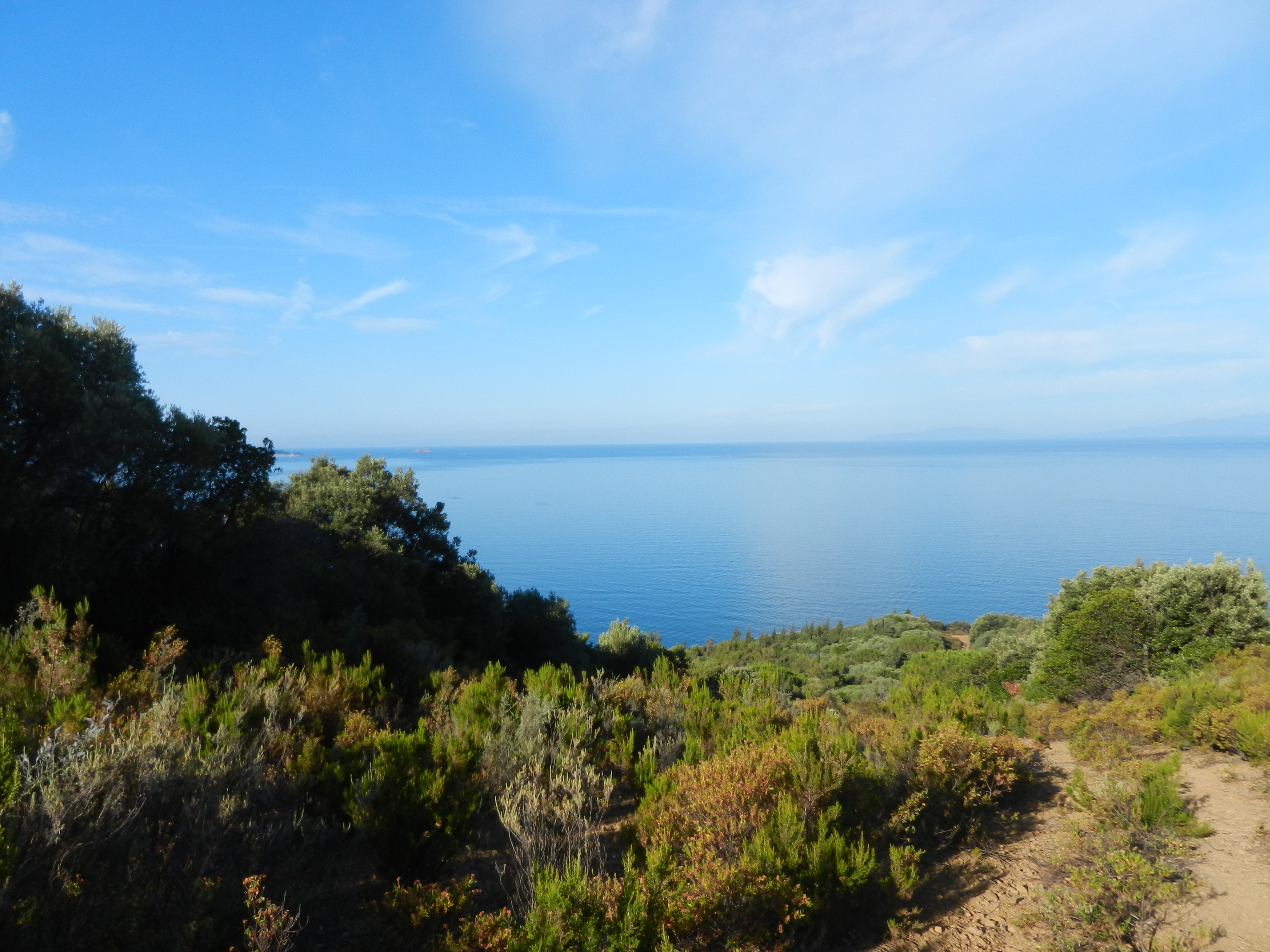 cessa antincendio